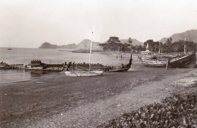 Maio de 1970 -Ainda restos de barcos dos tempos da ocupação japonesa